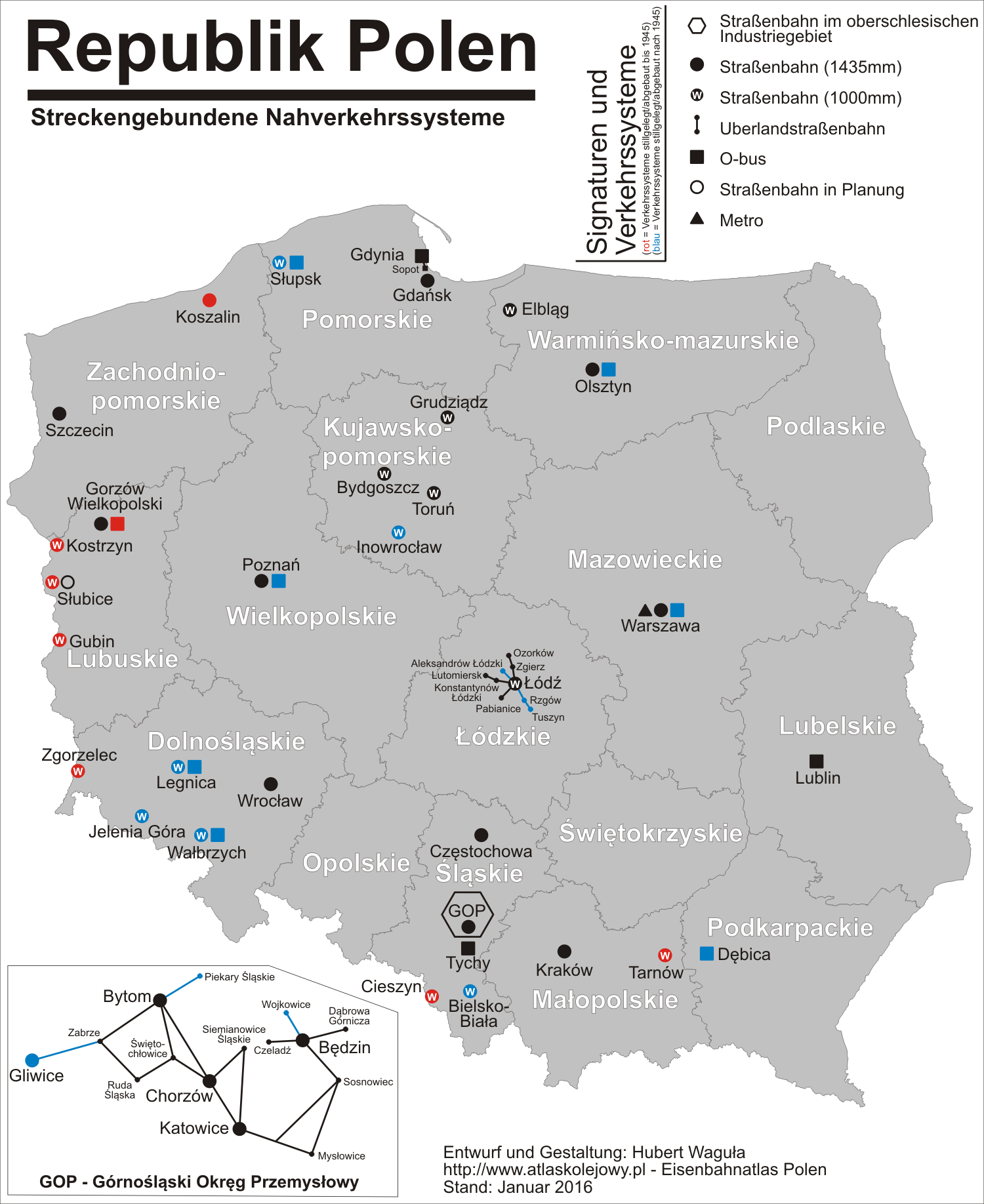 Republik Polen - Streckengebundene Nahverkehrssysteme